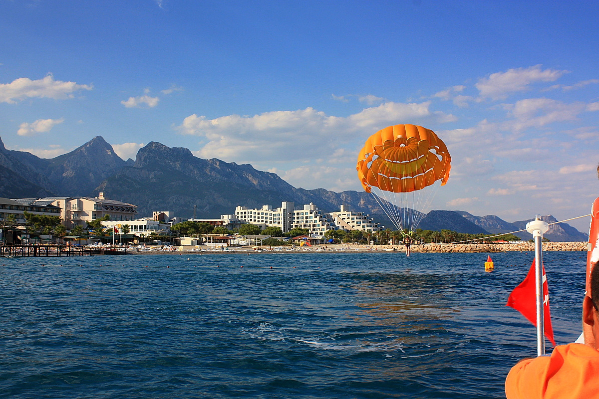 Toe deepen.